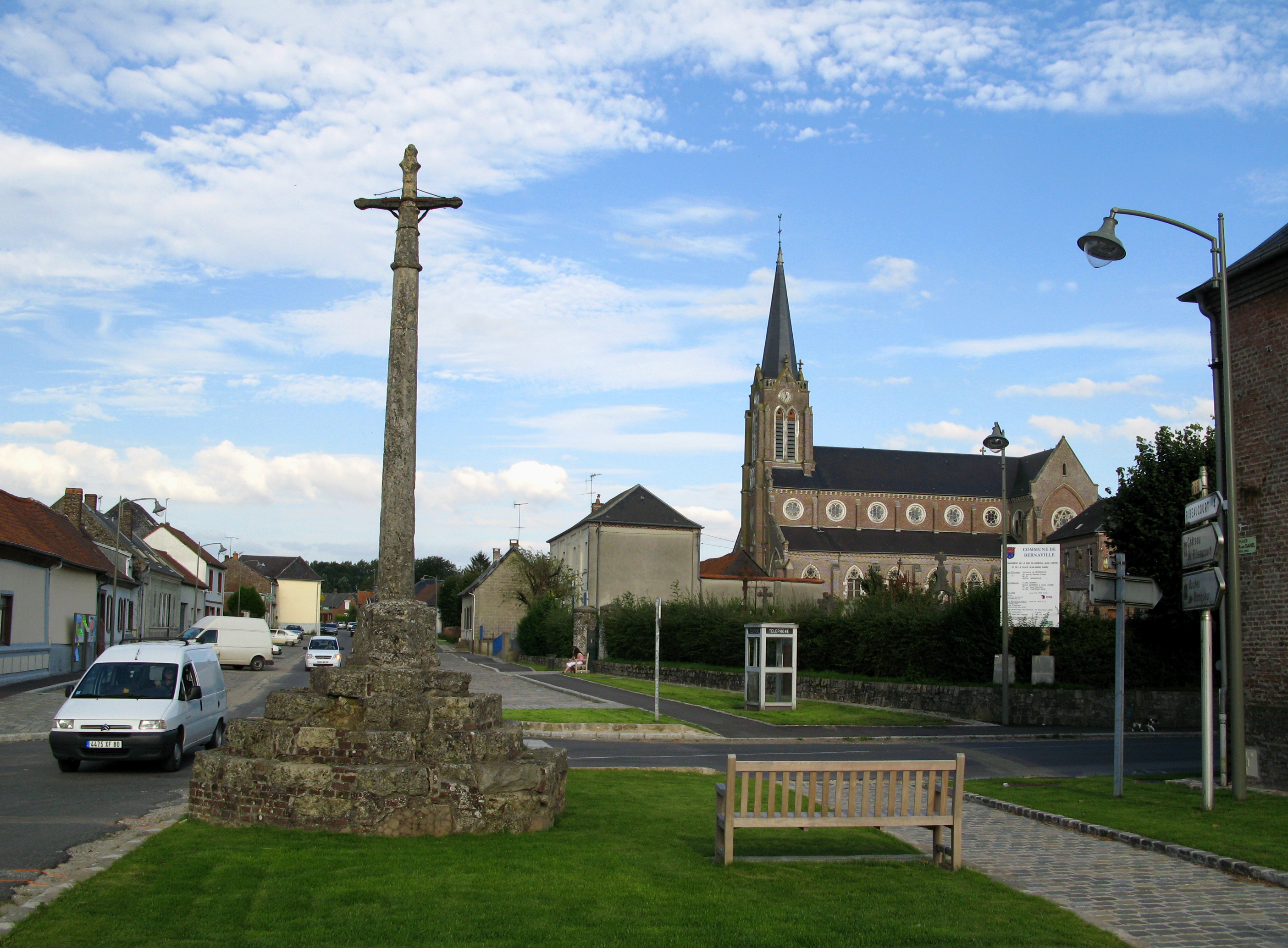 Bernaville (Somme, France) - La croix de pierre (qui servit jusque vers 2005 de rond-point) et l'église.